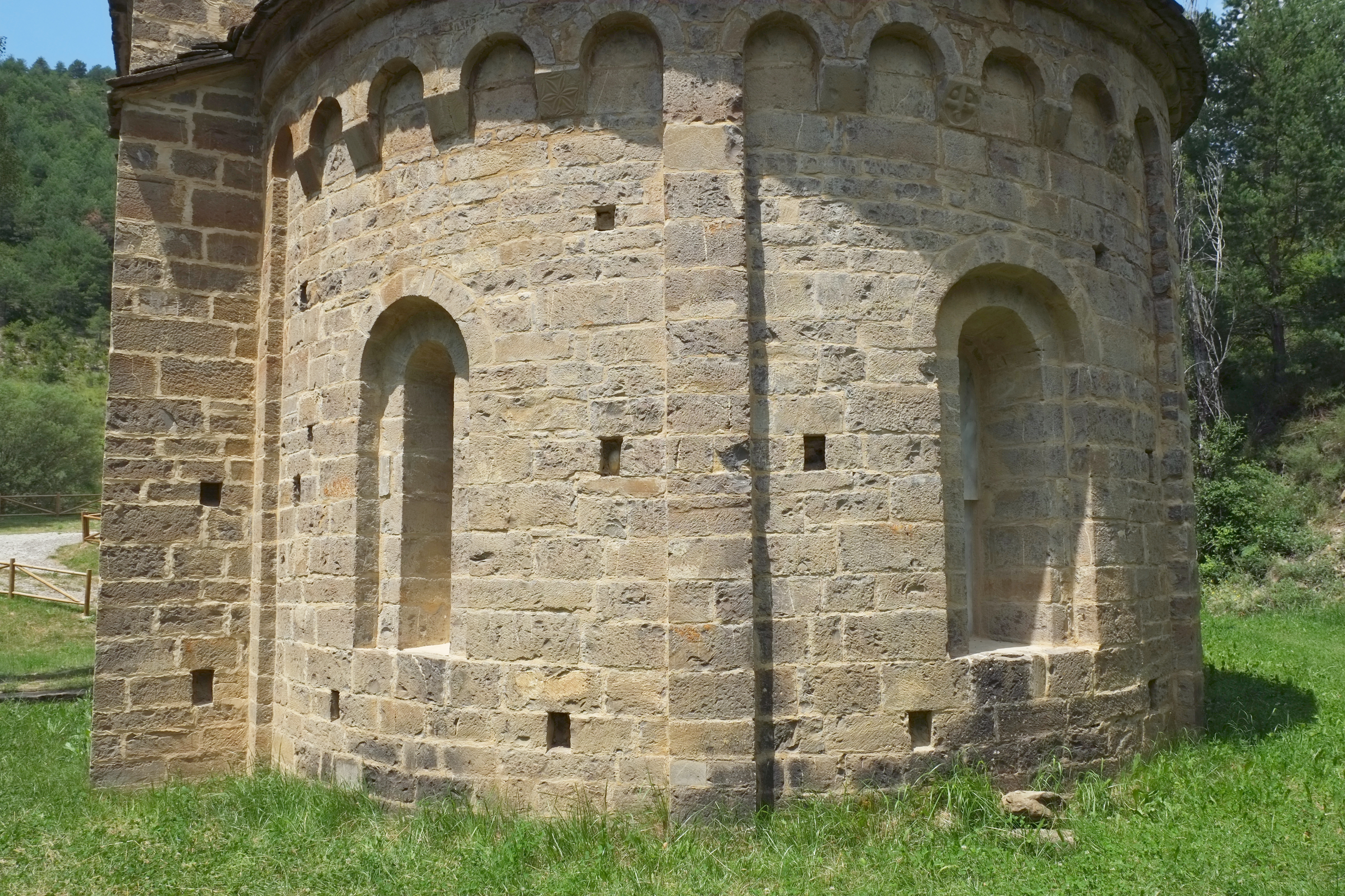 Ehemalige Klosterkirche San Adrián de Sasabe in Borau in der Provinz Huesca in Aragonien (Spanien)